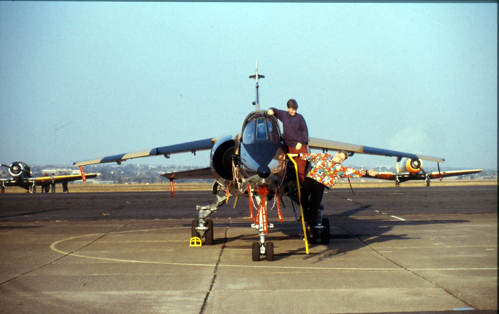 Mirage F1AZ at AFB Swartkop